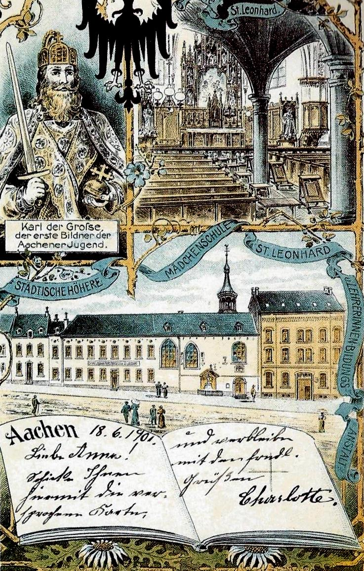 Scan einer alten Postkarte aus der Jahrhundertwende 1900 mit der Ansicht des ehemaligen Leonhard-Kloster und der Klosterkapelle in der Aachener Franzsstraße, später Höhere Töchterschule und Lehrerinnenbildungsanstalt